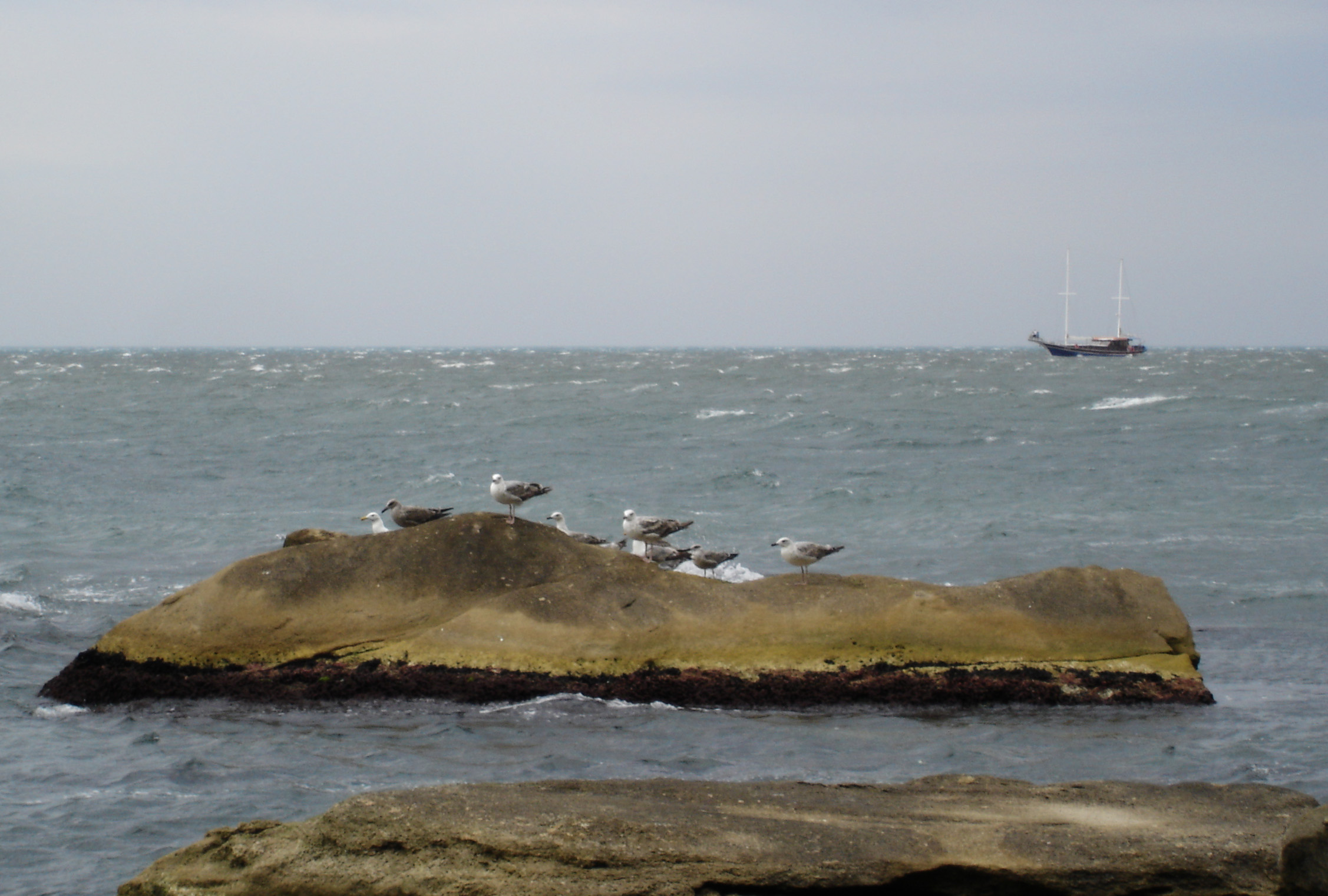 Cape Galata, near Varna, Bulgaria